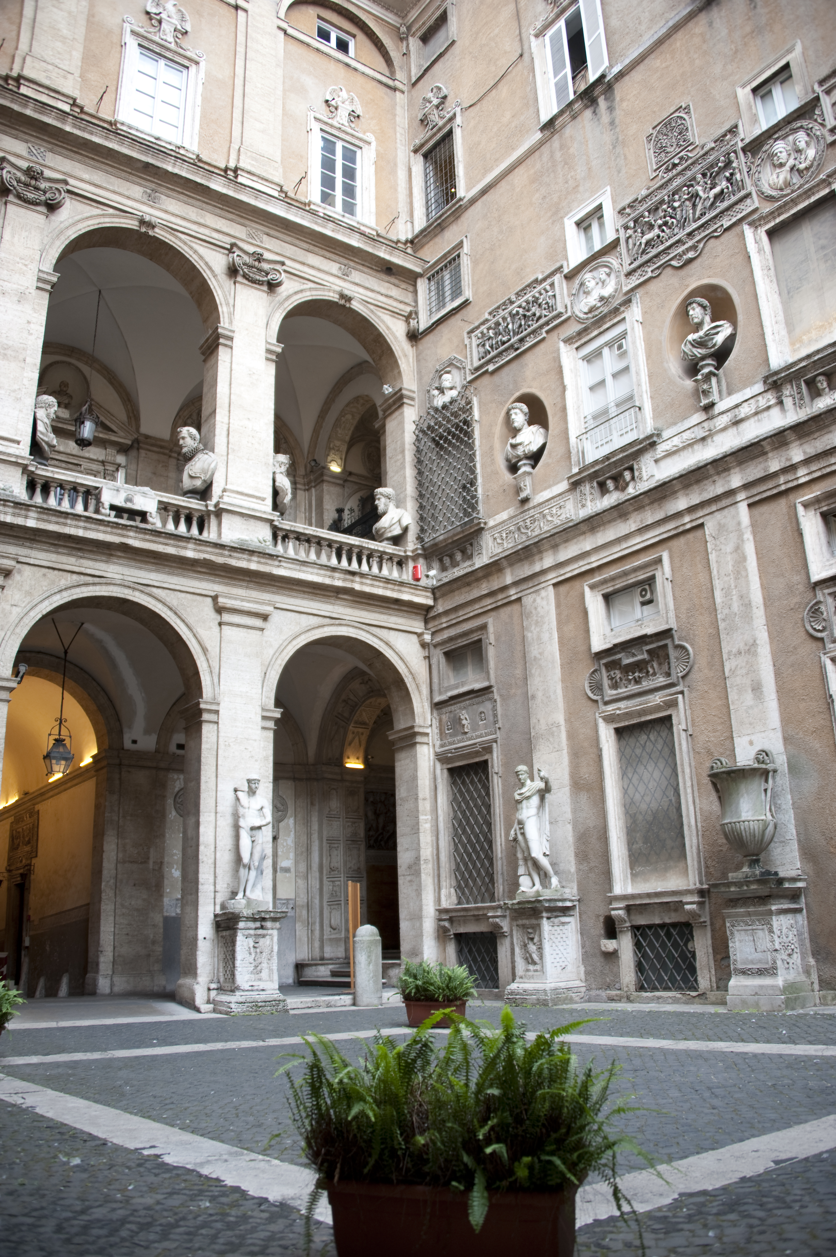 Biblioteca di Storia Moderna e Contemporanea - MIBAC